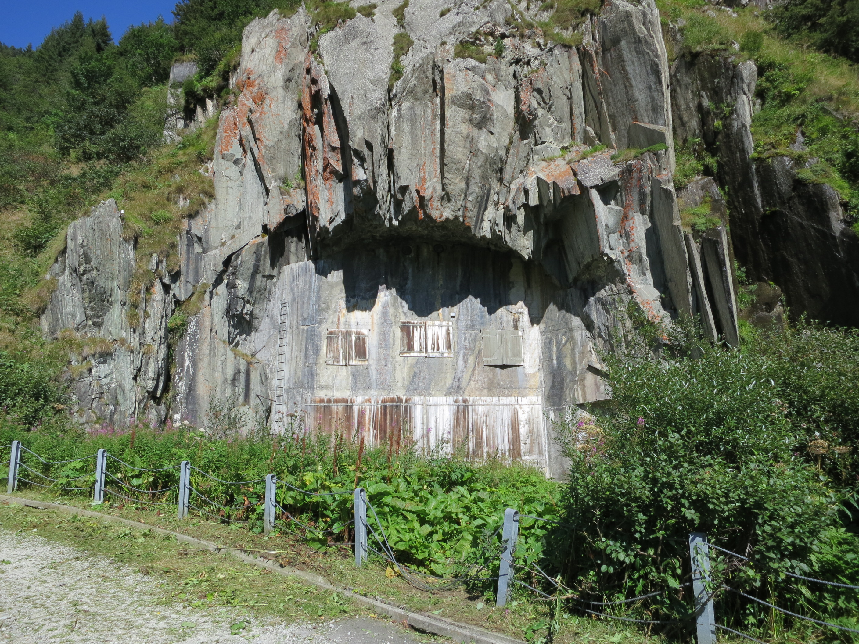 Flankiergalerie Altkirch, Andermatt UR, Schweiz